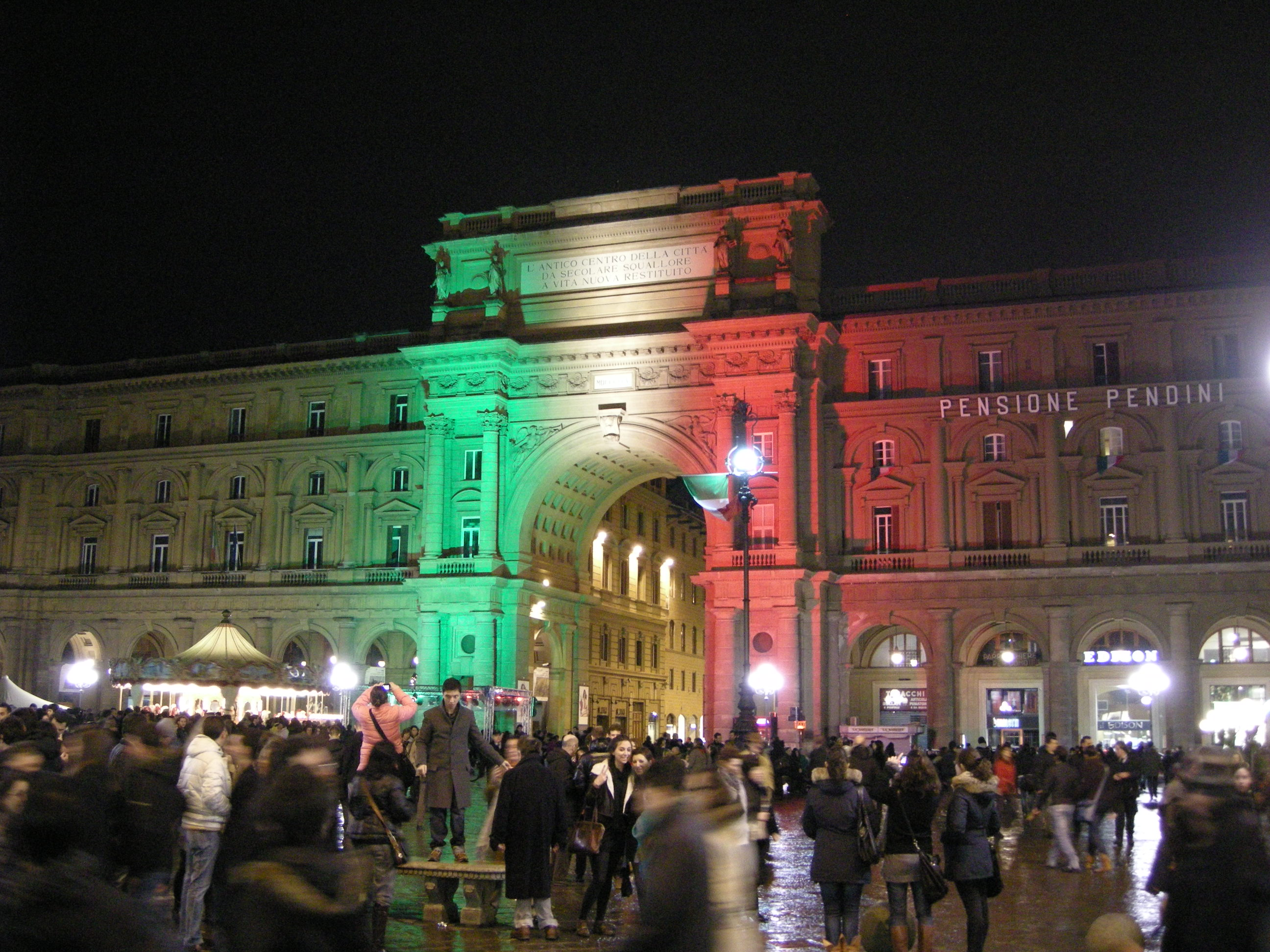 Firenze, serata tricolore, piazza della repubblica